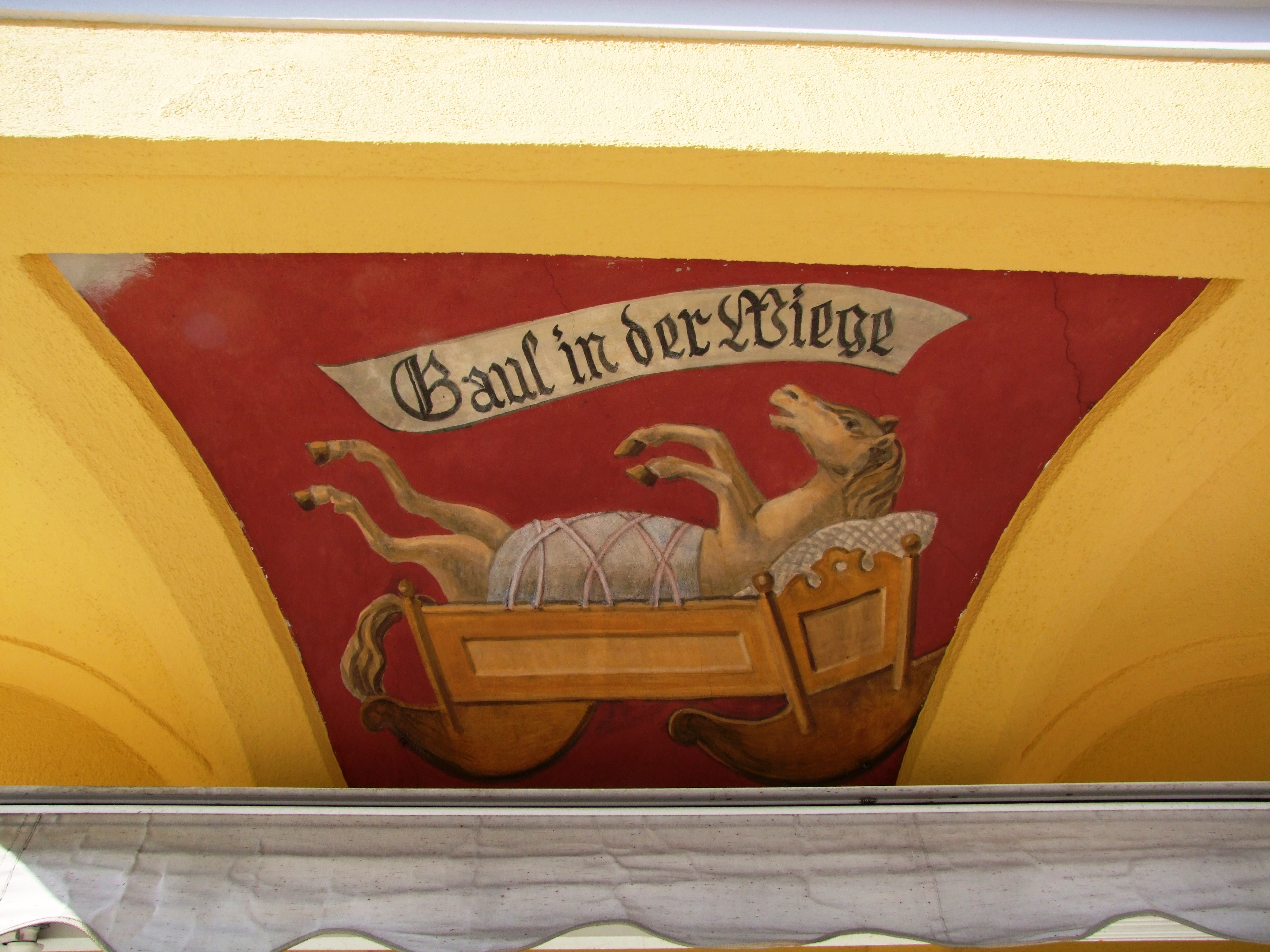 Hausfassade in der Kalchstraße im oberschwäbischen Memmingen